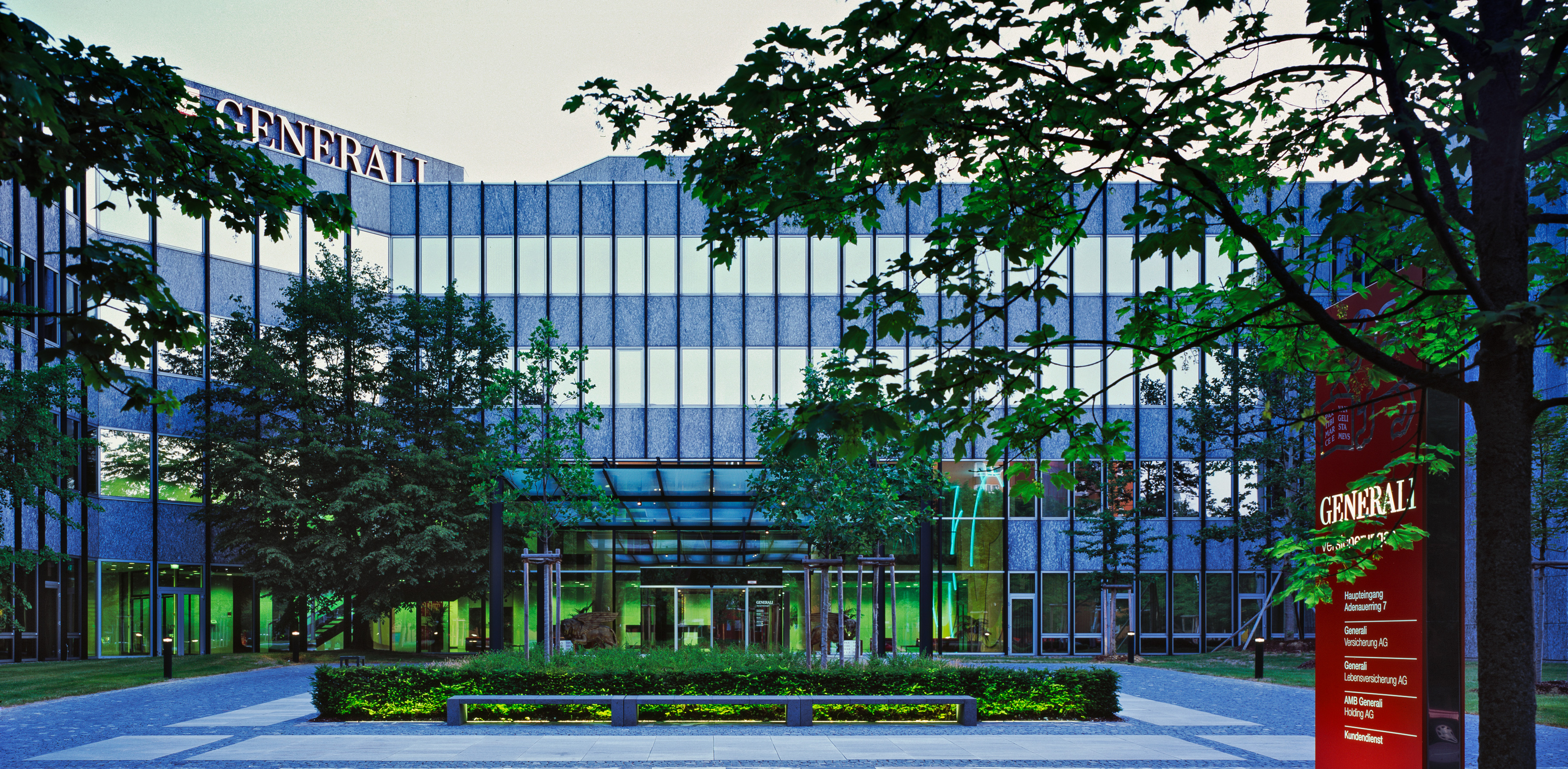 Bild der Generali Deutschland Konzernzentrale in München